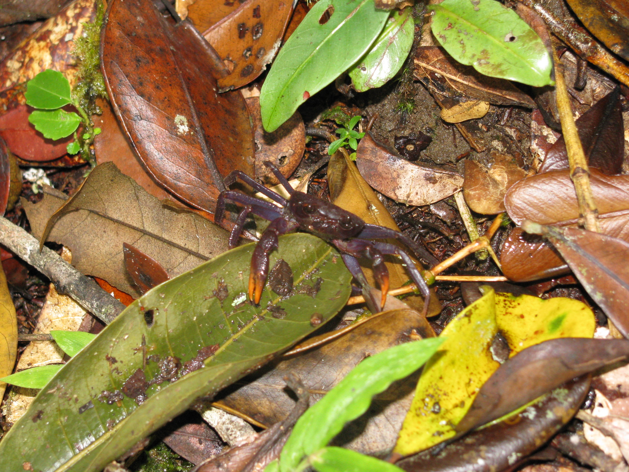 terrestrial crab in Andasibe-Mantadia National Park, Madagascar